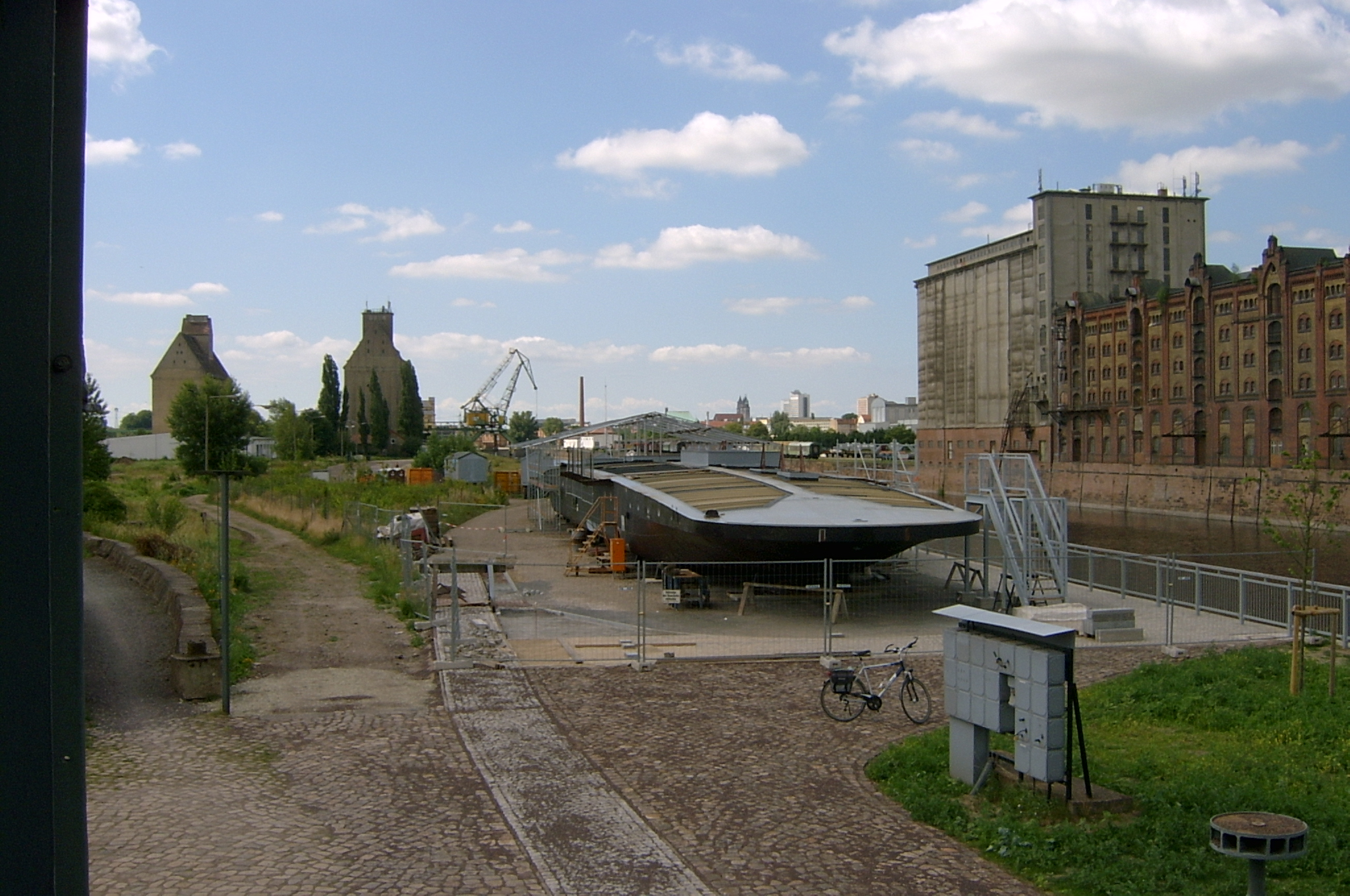 Magdeburger Handelshafen, Kettendampfer "Gustav Zeuner" im Hintergrund Speichergebäude